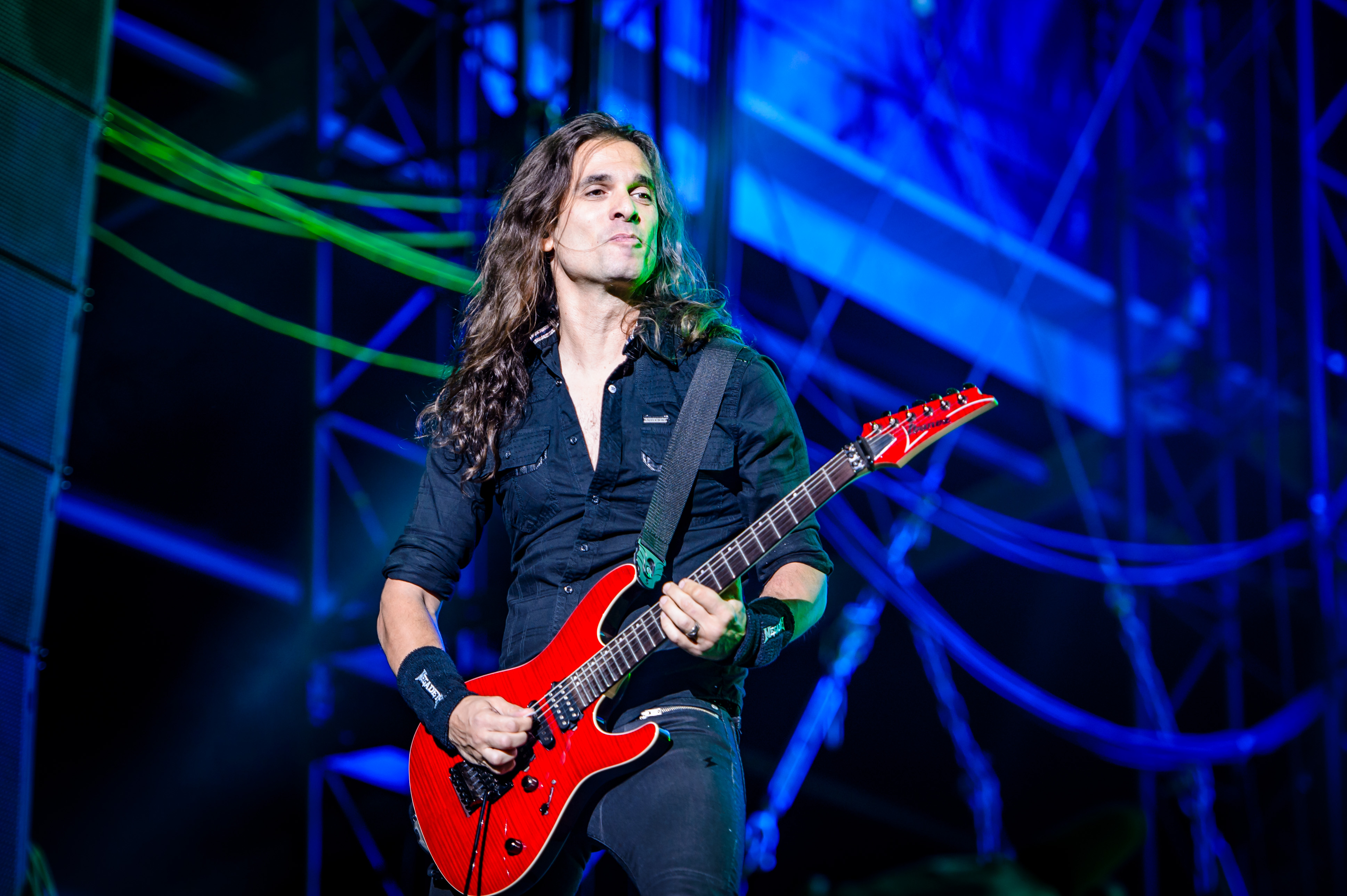 'Wacken Open Air 2017; Wacken': 'Megadeth'